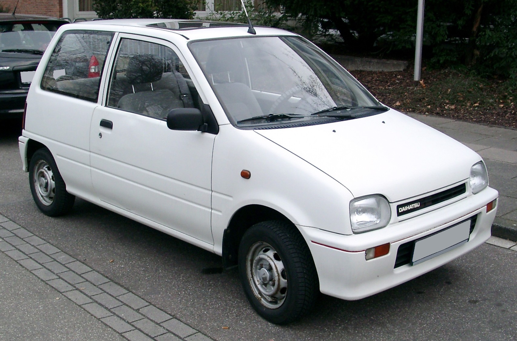 Daihatsu Cuore